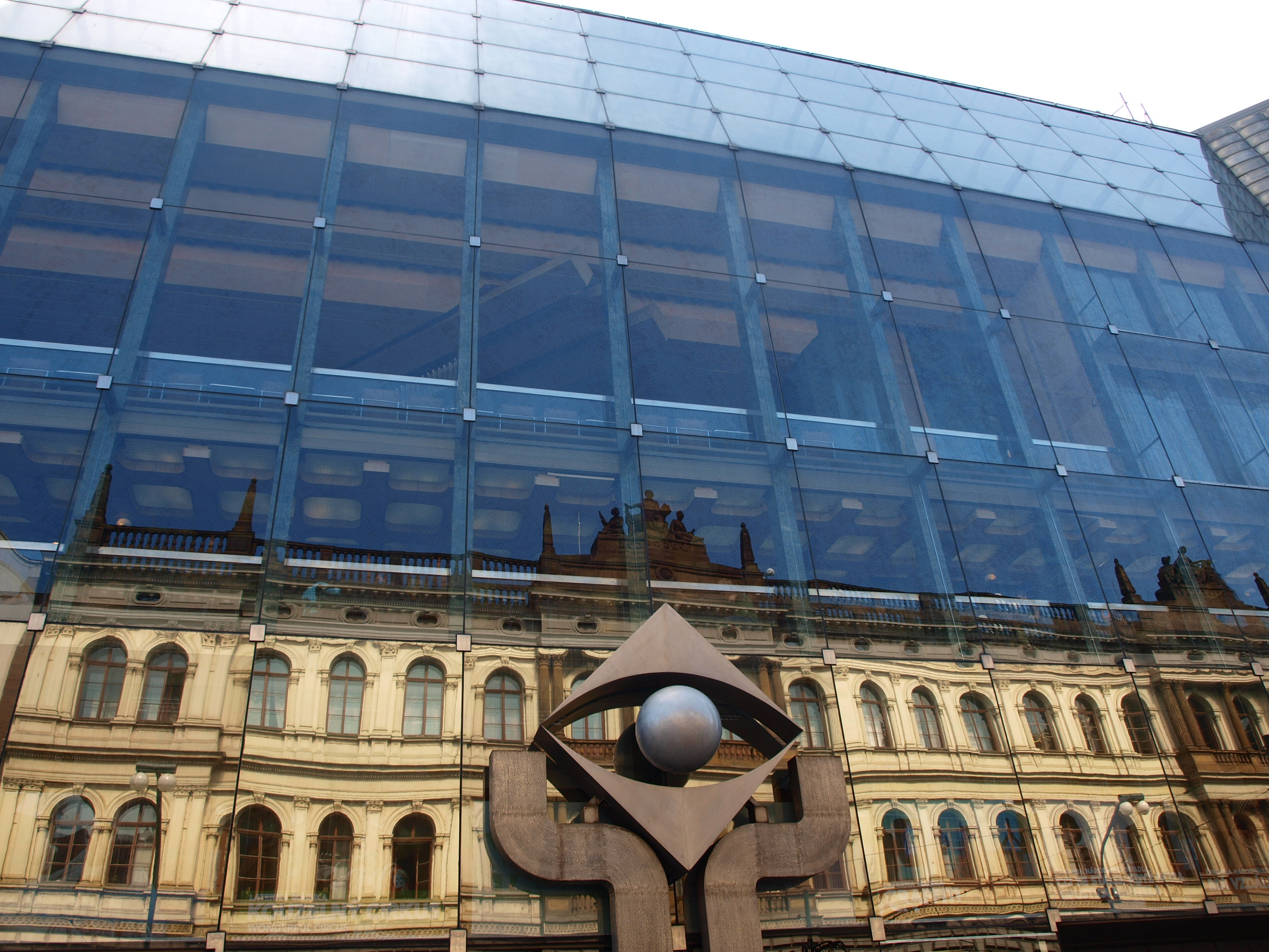 Lterna magica